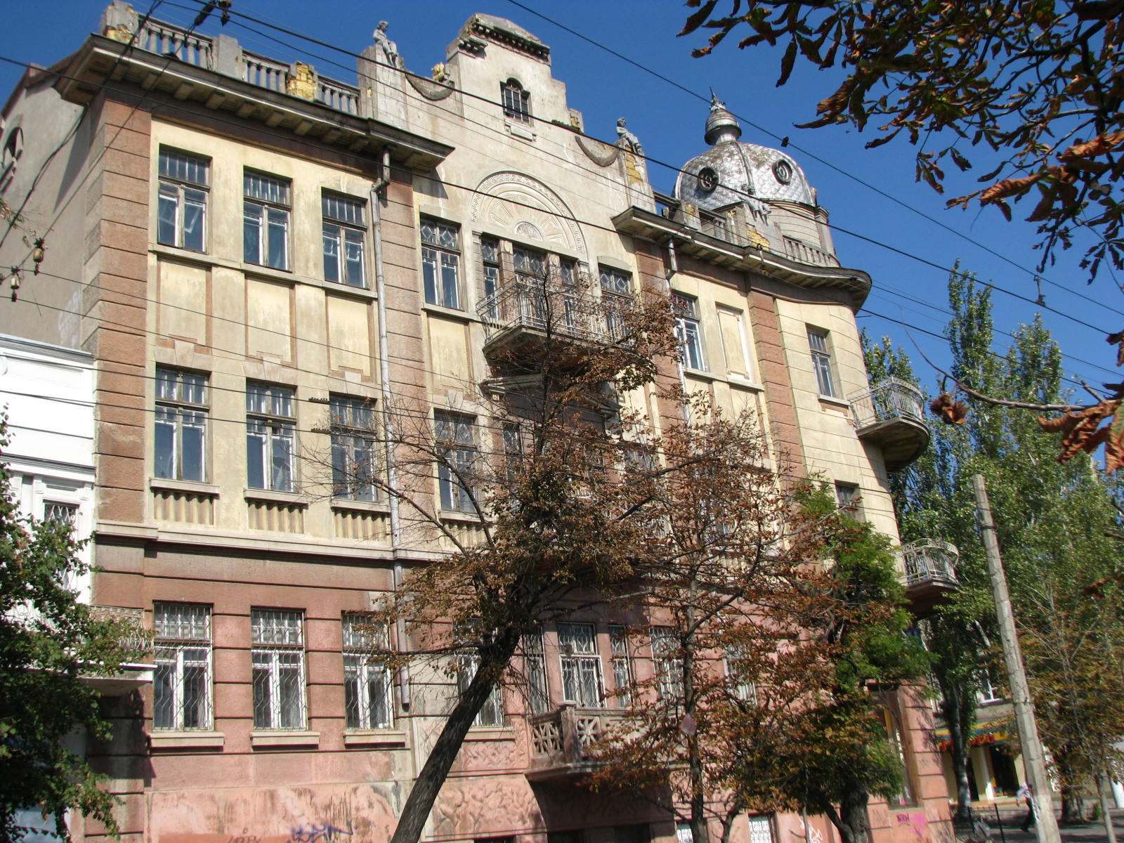 Готель “Європейський” ( нині - готель “1 Травня” ), Херсон, Леніна вул., 26